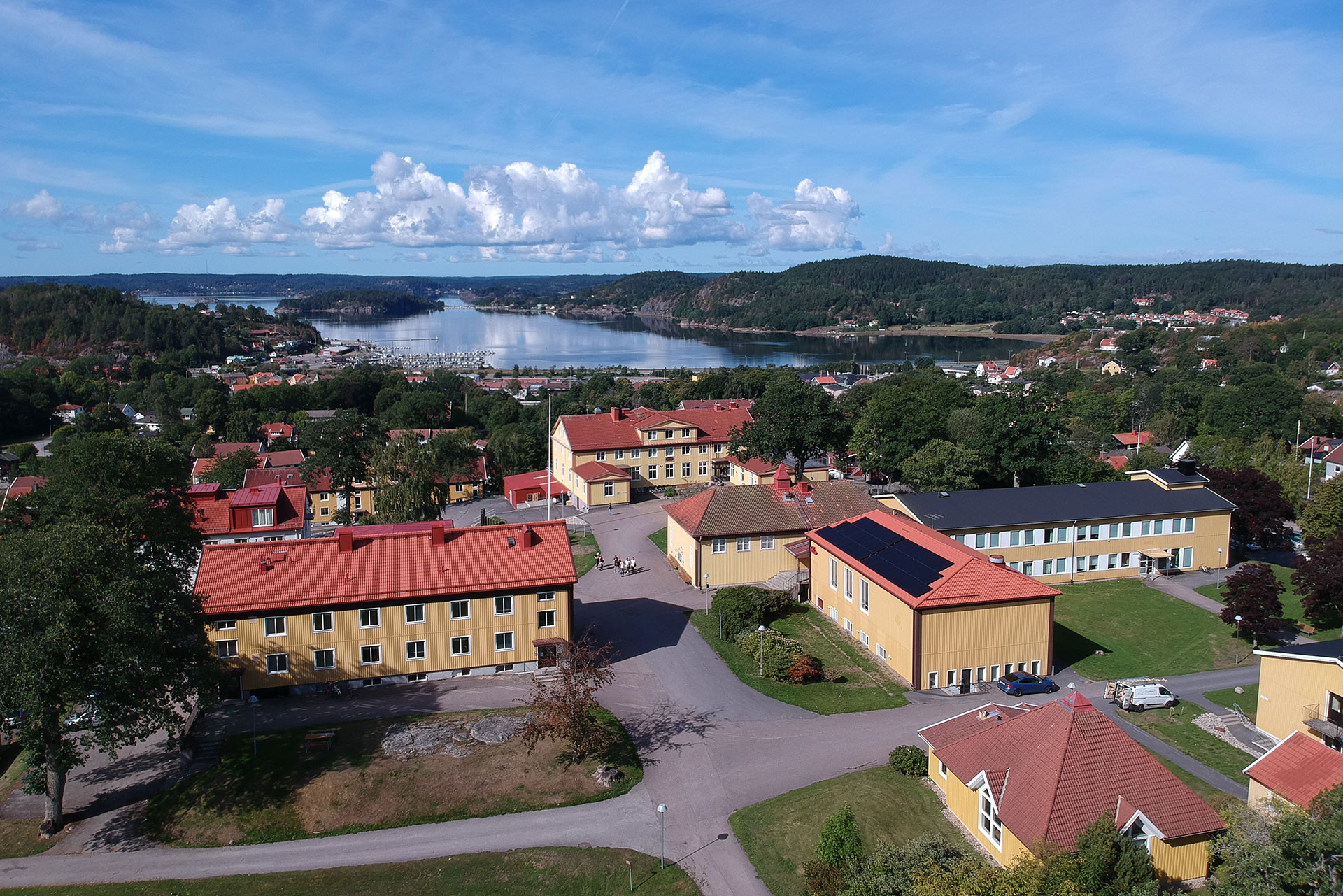 Ljungskile folkhögskola, bildad 1923, med plats för ca 240 studerande. Heltidsstudier, korta kurser, distanskurser. Internat, hotelldel, konferensverksamhet och sommartid även vandrarhem.